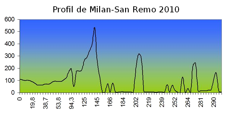 Profil de Milan-San Remo 2010